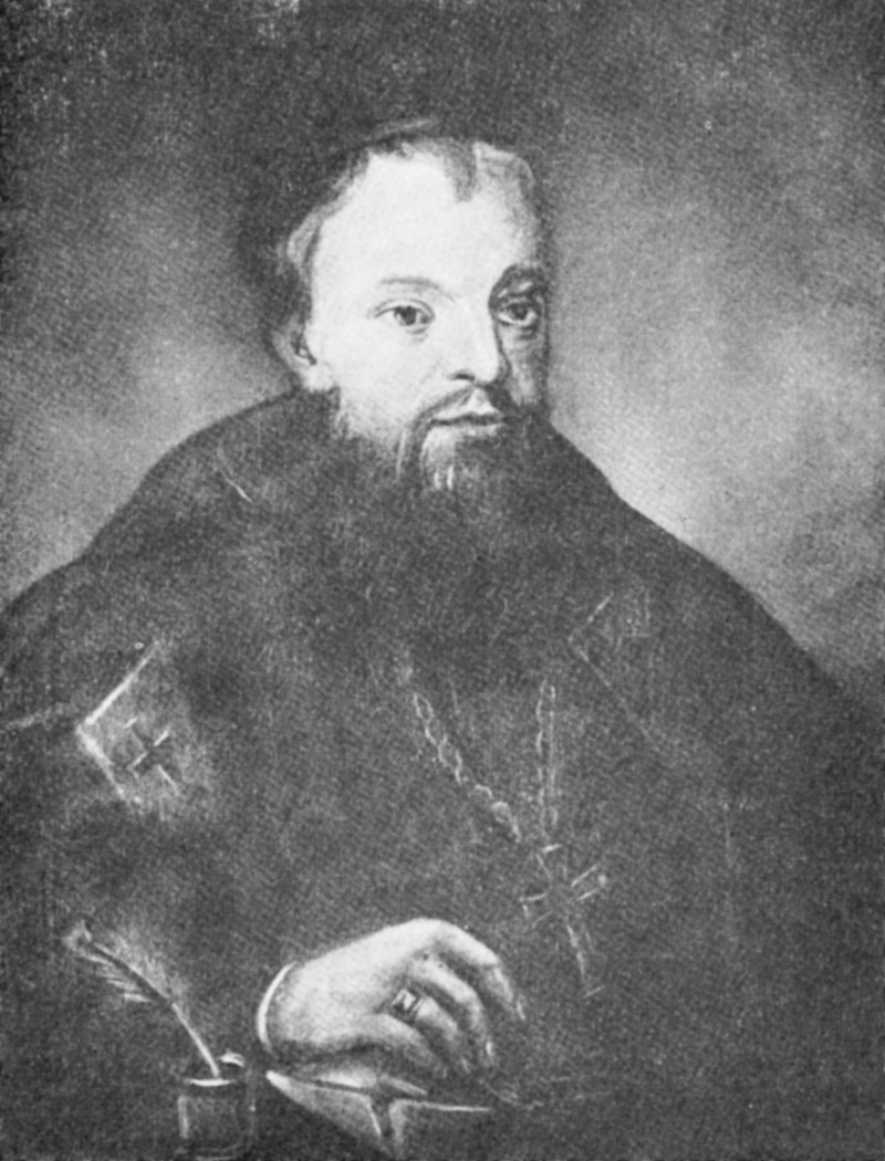 Беларуская (тарашкевіца): Рафал Корсак